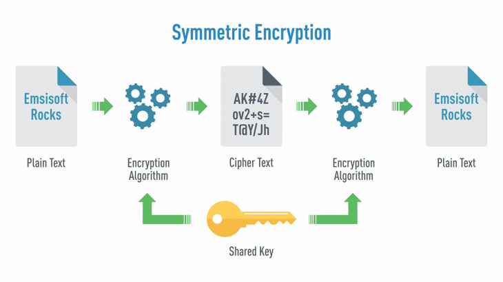 Монгол: Симметрик түлхүүрийн шифрлэлт